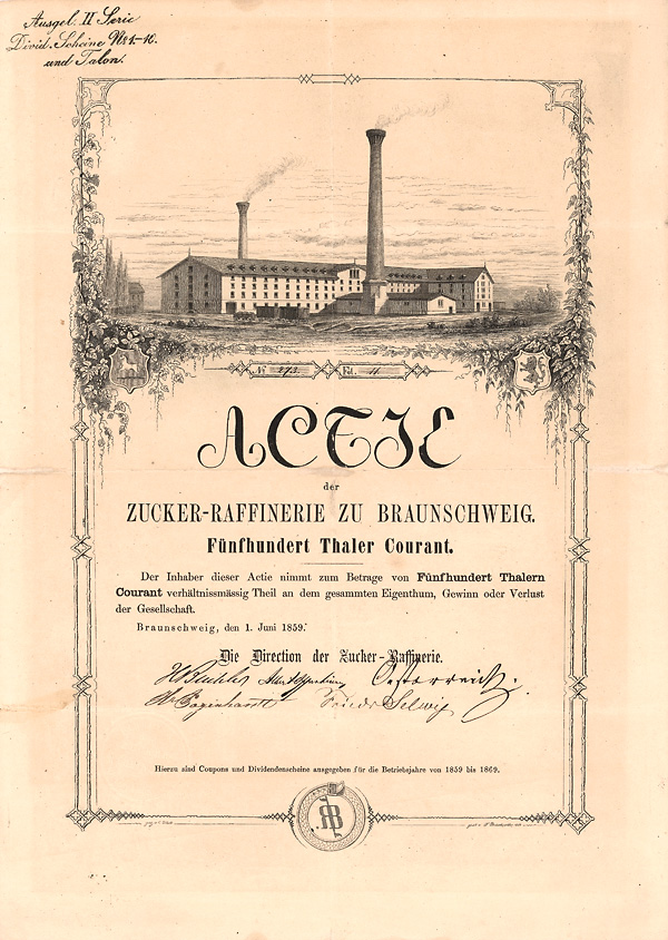 Eine von vermutlich nur zwei erhaltenen Gründeraktien, hier die Nr. 273, der ehemaligen Zucker-Raffinerie zu Braunschweig, mit einer Abbildung des Fabrikgebäudes auf dem Buchler'schen Gelände an der heutigen Luisenstraße gegenüber der ehemaligen Buchler'schen Chininfabrik. Das Dokument trägt die originalen Unterschriften der Herren H. Buchler, Albert Oppenheim (österreichischer Landessyndikus sowie Mitbegründer der Braunschweigischen Bank), H. Bogenhardt und Friedr. Selwig (von der Maschinenfabrik Selwig & Lange, die bis 1988 Ausrüstungen für die Zuckerindustrie herstellte). Ein ähnliches Papier war 1996 auf der 41. Freunde-Auktion in Goslar für 12.000 DM versteigert worden und wurde zuletzt 2015 für einen Schätzpreis von 20.000 Euro bei gutkowski.de ausgerufen. Das Unternehmen wurde nach wirtschaftlichen Schwierigkeiten der Gesellschaft infolge einer Krise auf dem Zuckermarkt 1881 unter gleichem Namen erneut gegründet. Die abgebildtete Raffinere brannte 1900 bis auf die Grundmauern nieder, wobei der schmelzende Zucker wie flüssige Lava aus den Fenstern der Fabrik gequollen sein soll. Späterer Großaktionär war die Zuckerraffinerie Hildesheim GmbH. Nachdem zu Beginn des Zweiten Weltkriegsés die Raffinerie am 30. September 1939 stillgelegt wurde, wurden die Fabrik- und Lagerräume vermietet. Ein Sprengungsversuch für das Hauptgebäude in den 1950er Jahren mißlang; der meterdicke Beton des riesigen Trichtersilos ließ sich nicht so einfach zerstören. Die Gebäuderuine wurde später jedoch als Industriedenkmal unter Denkmalschutz gestellt. Ab 1998 entwickelte sich auf dem Grundstück ein Gewerbepark, das alte Raffineriegebäude wurde unter denkmalpflegerischen Gesichtspunkten restauriert ...